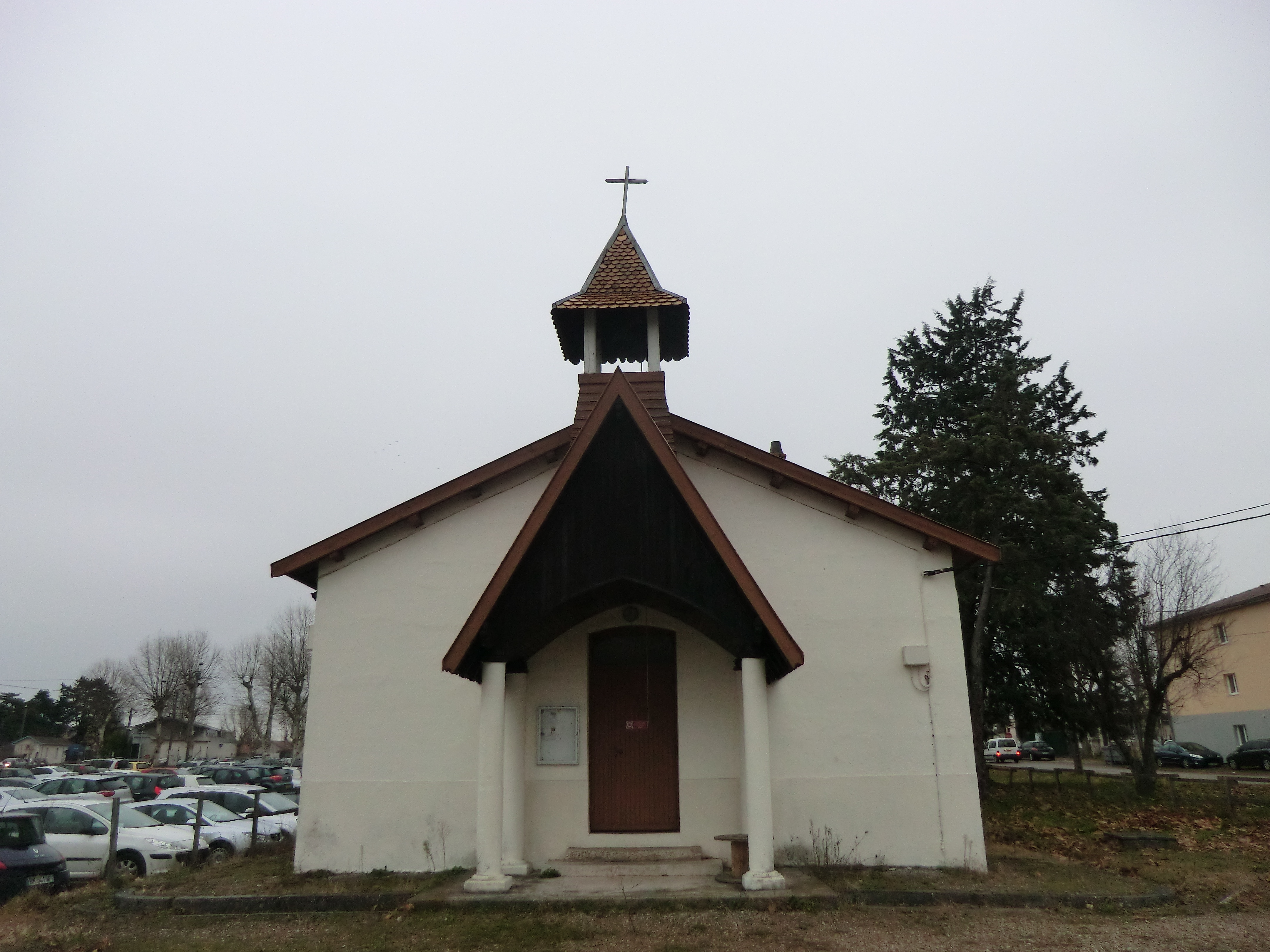 Chapelle du camp militaire de La Valbonne.